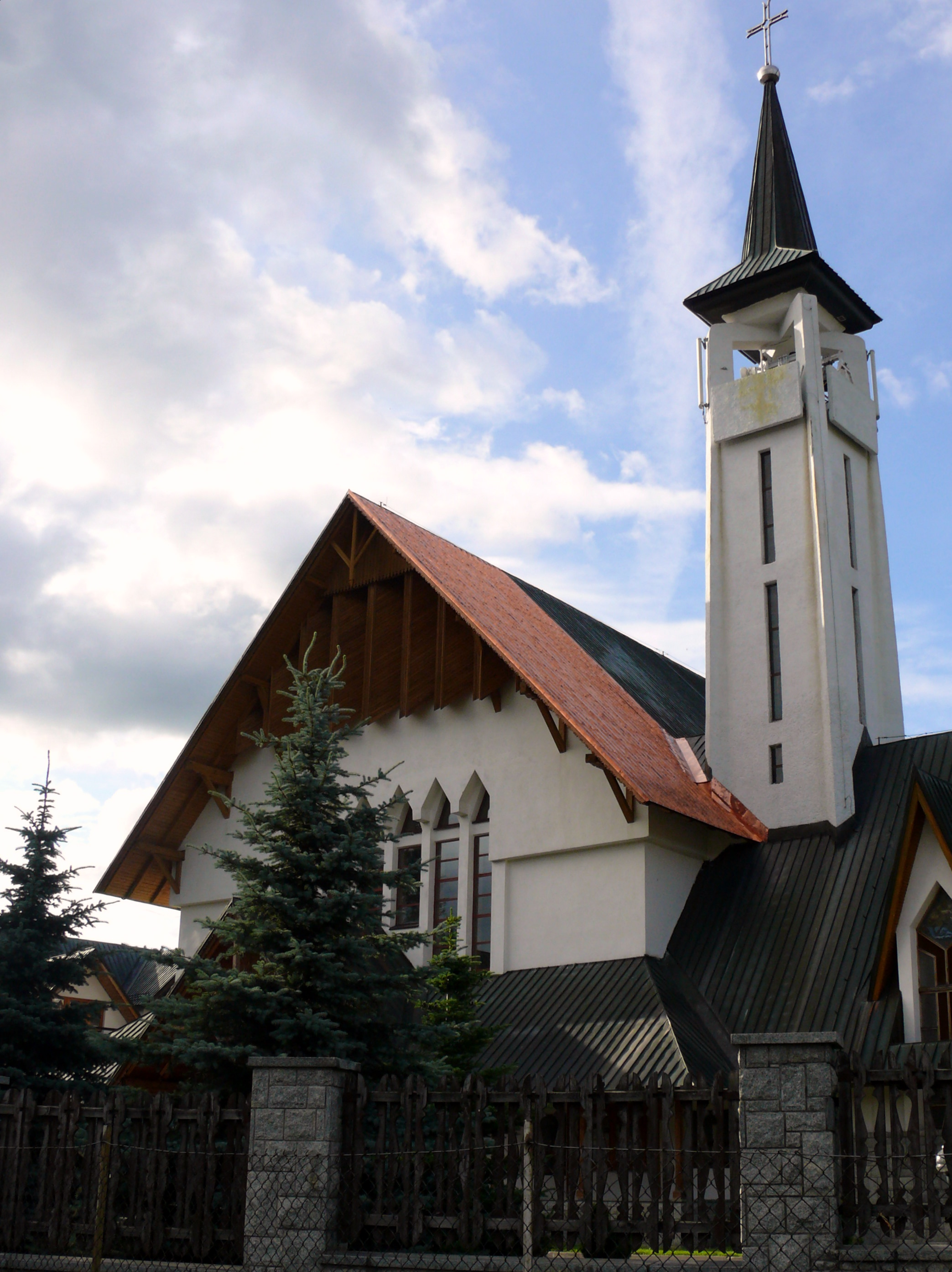 Kościół Miłosierdzia Bożego w Zakopanem-Cyrhli